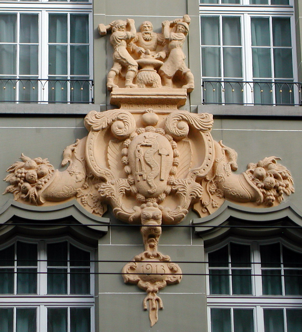 Wappen der Zunftgesellschaft zu Schmieden an deren Zunfthaus an der Marktgasse 10 (Schmiedenplatz 5)